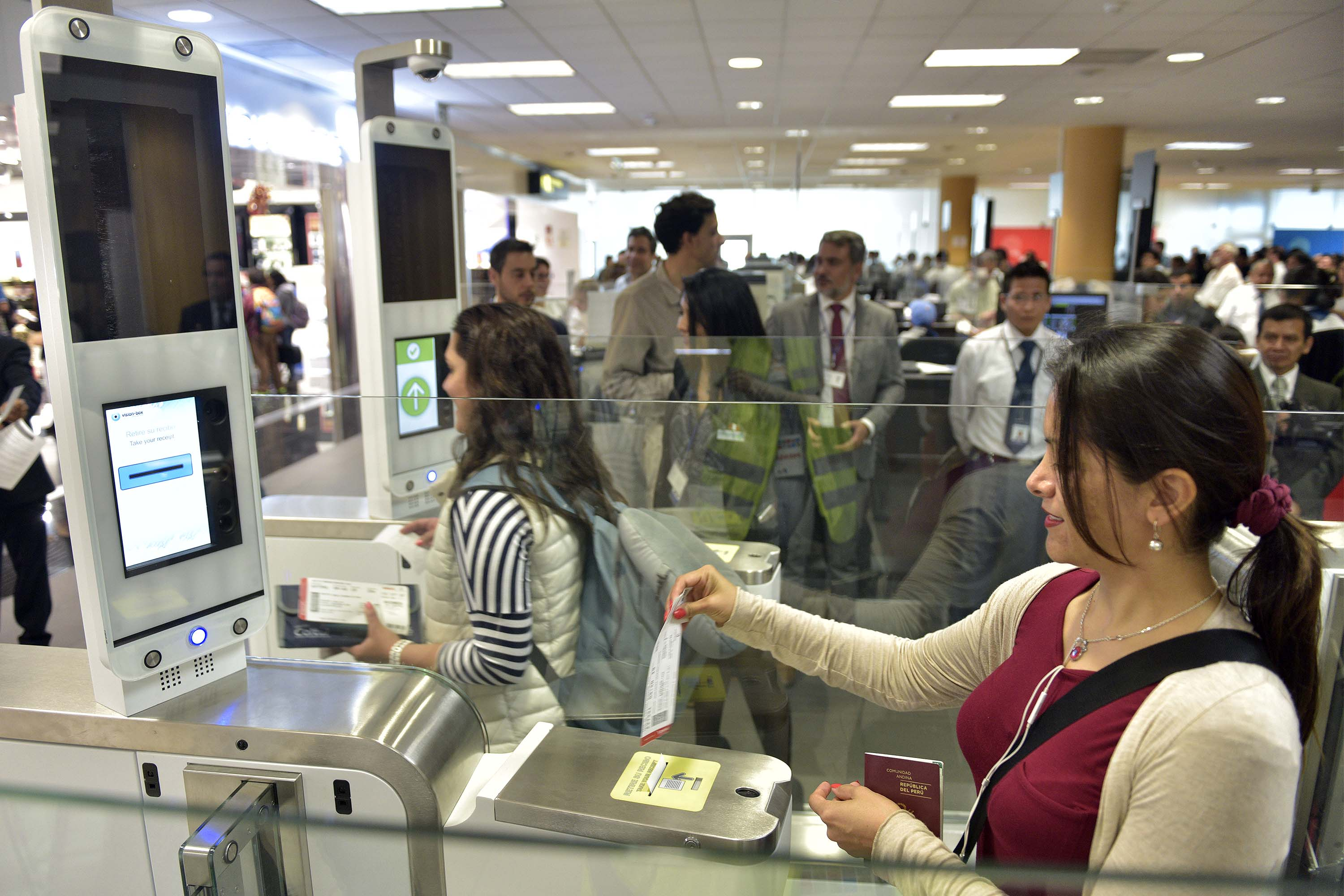 Uso de puertas biométricas en Aeropuerto Internacional Jorge Chávez.